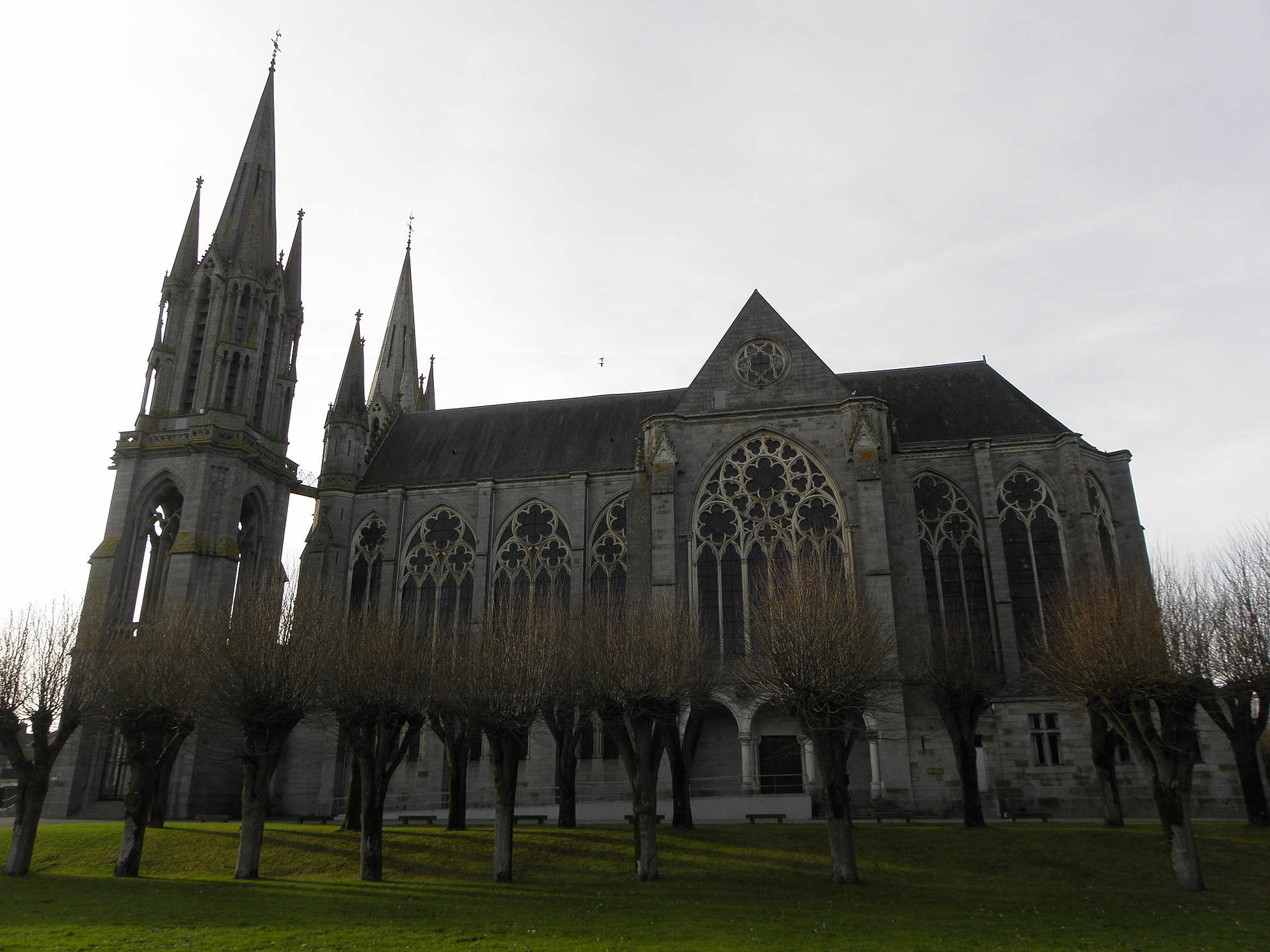 Façade est de la basilique Notre-Dame-d'Espérance de Pontmain (53).